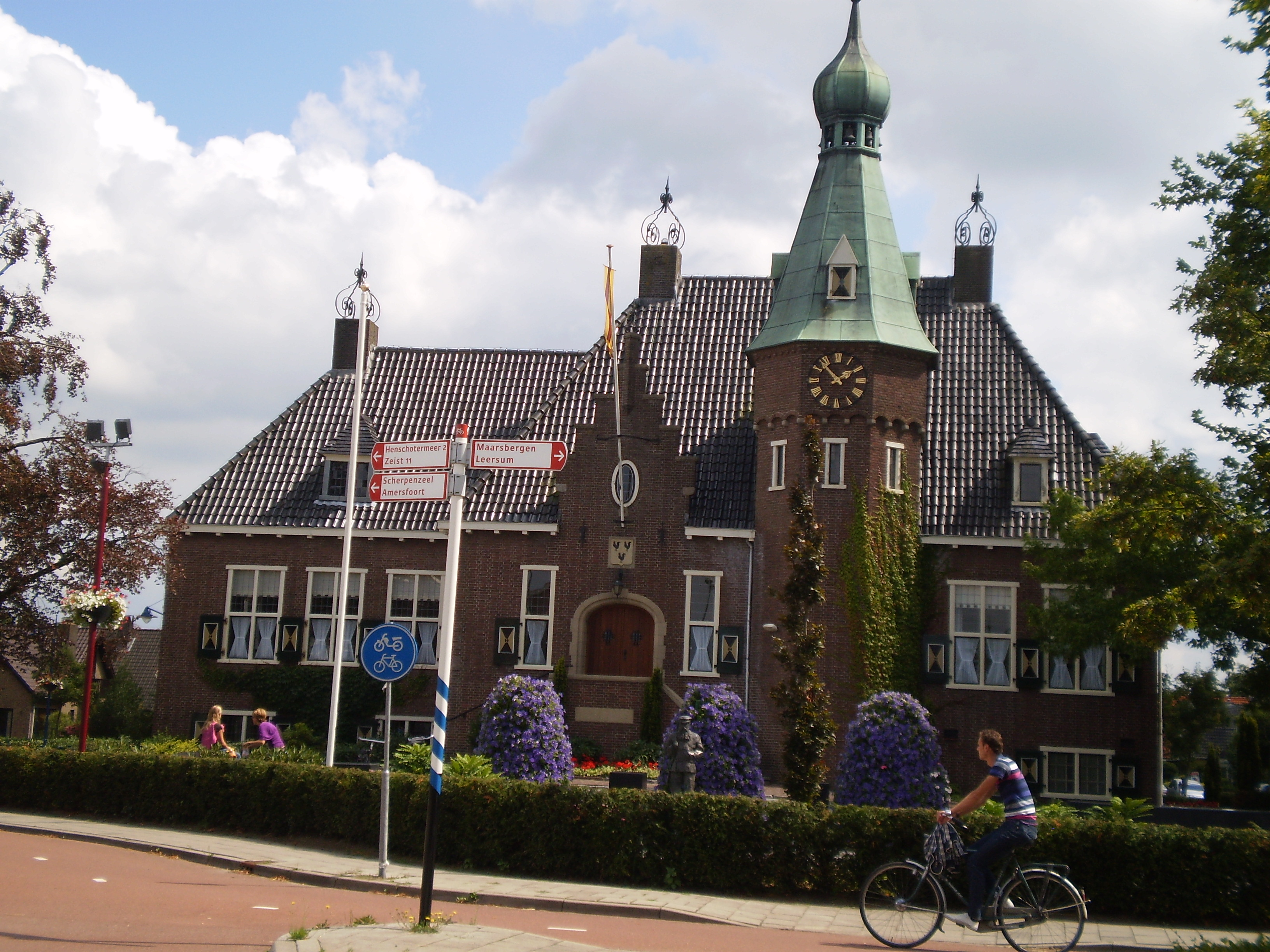 Gemeentehûs fan Wâldenberch.